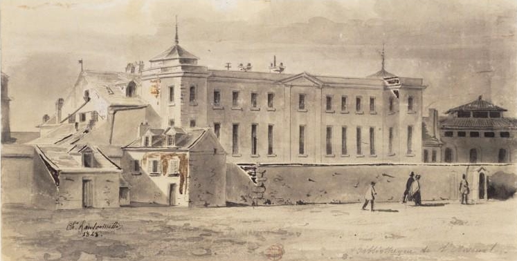 La Bibliothèque de l'Arsenal vue du boulevard Morland. Dessin de Charles Ransonnette (1793-1877).